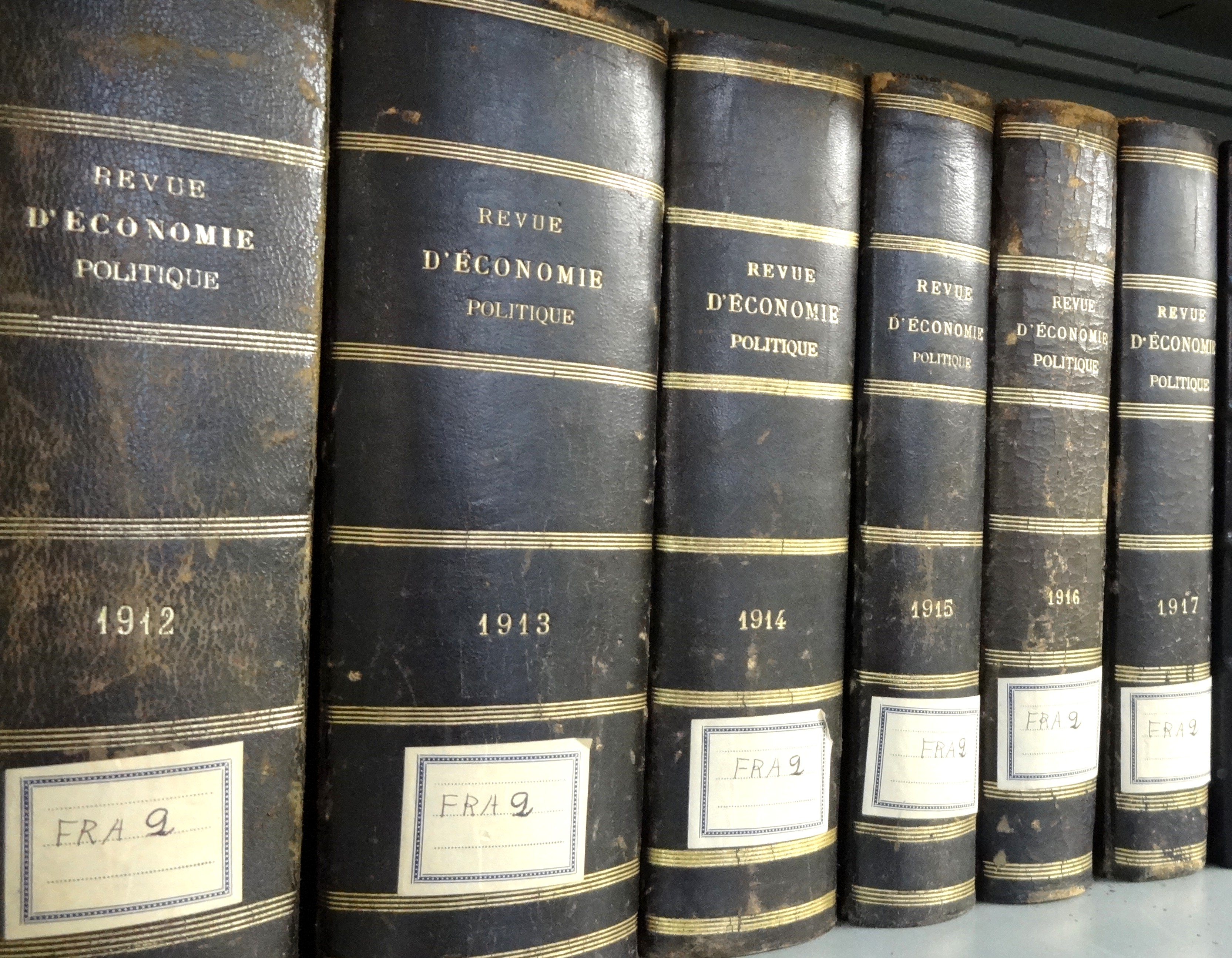 Publication périodique dont la collection est conservée à la bibliothèque de l'Insee